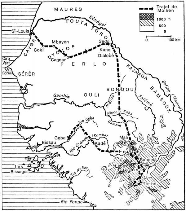 Carte